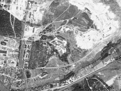 Fort IV Twierdzy Poznań sfotografowany przez satelitę KH-4A 1023, 23 sierpnia 1965 r.